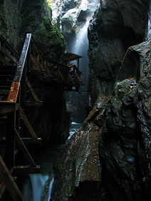 Sigmund-Thun-szurdok, Kaprun, Ausztria